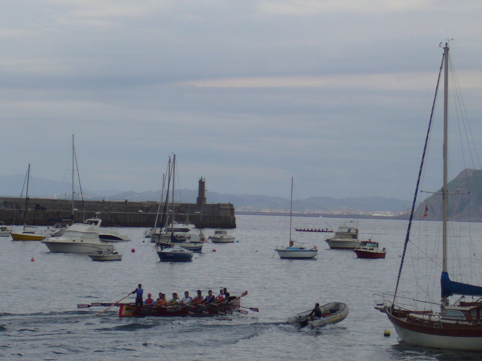 Une trainera à Castro Urdiales. La trainera était à l'origine une embarcation de pêche, typique de la côte Cantabrique. Aujourd'hui ces embarcations sont dédiées au sport et de nombreuses régates sont organisées. C'est un exemple d'instrument de travail qui devient instrument de loisirs et donne lieu à des compétitions. Ce sport est très réglementé, en ce qui concerne le poids et les dimensions des bateaux.